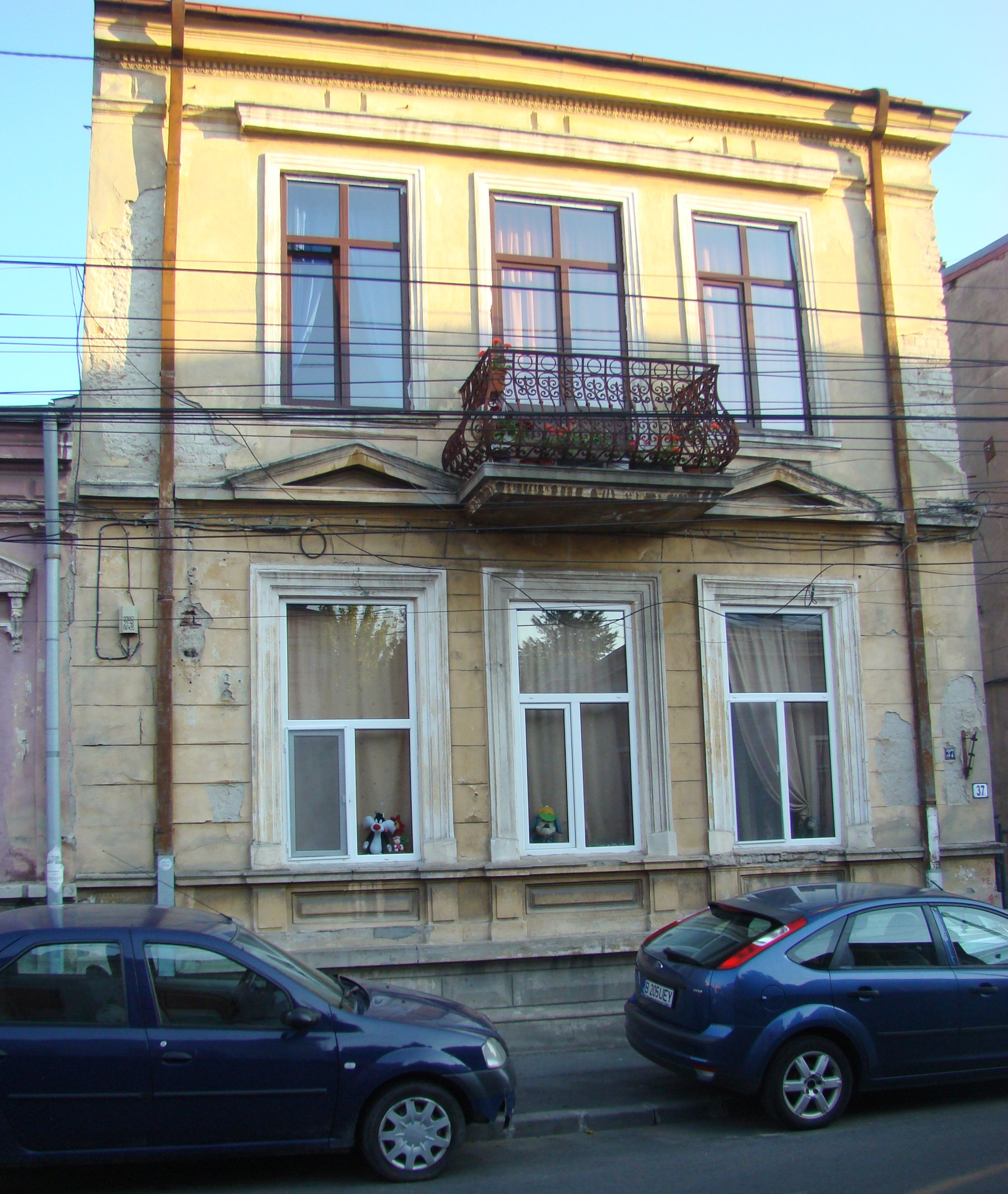 Clădire monument istoric, str. Mircea Vulcănescu, nr.37